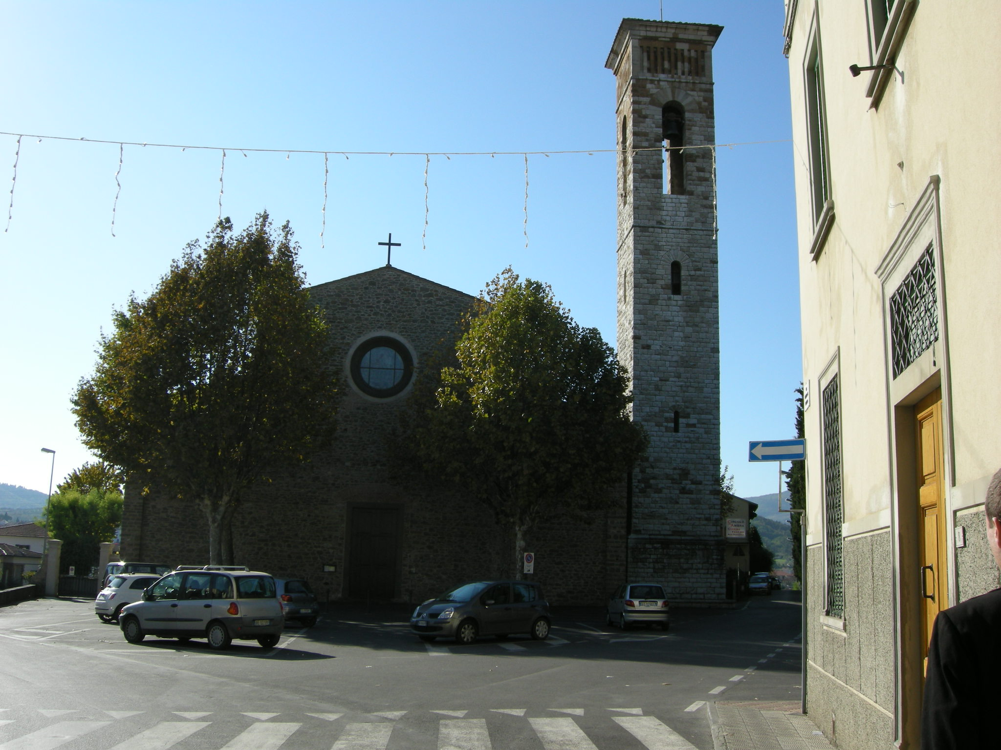 Poggio a caiano, Propositura di Santa Maria del Rosario